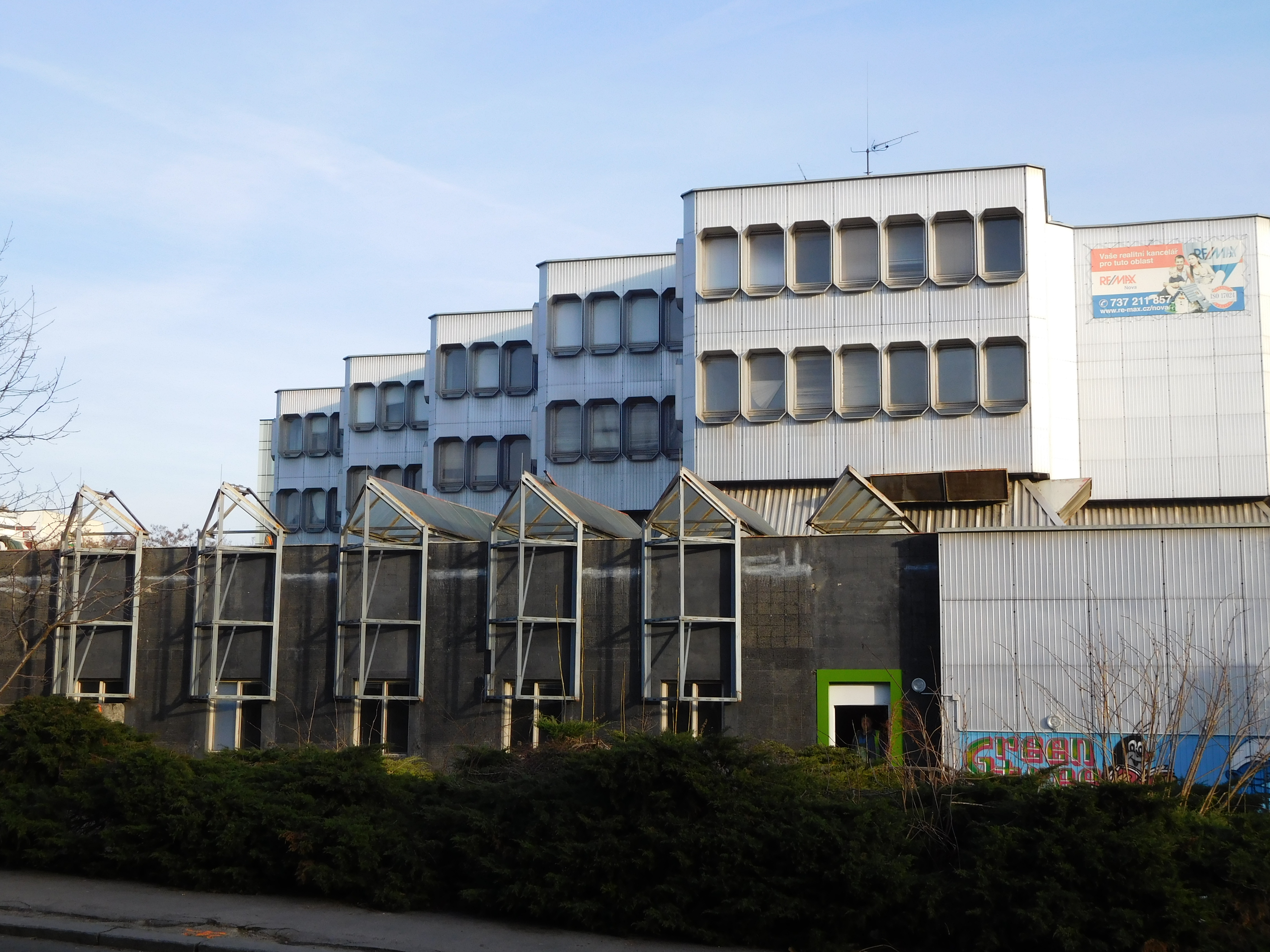 Praha 6 - Dejvice - Automatická telefonní ústředna